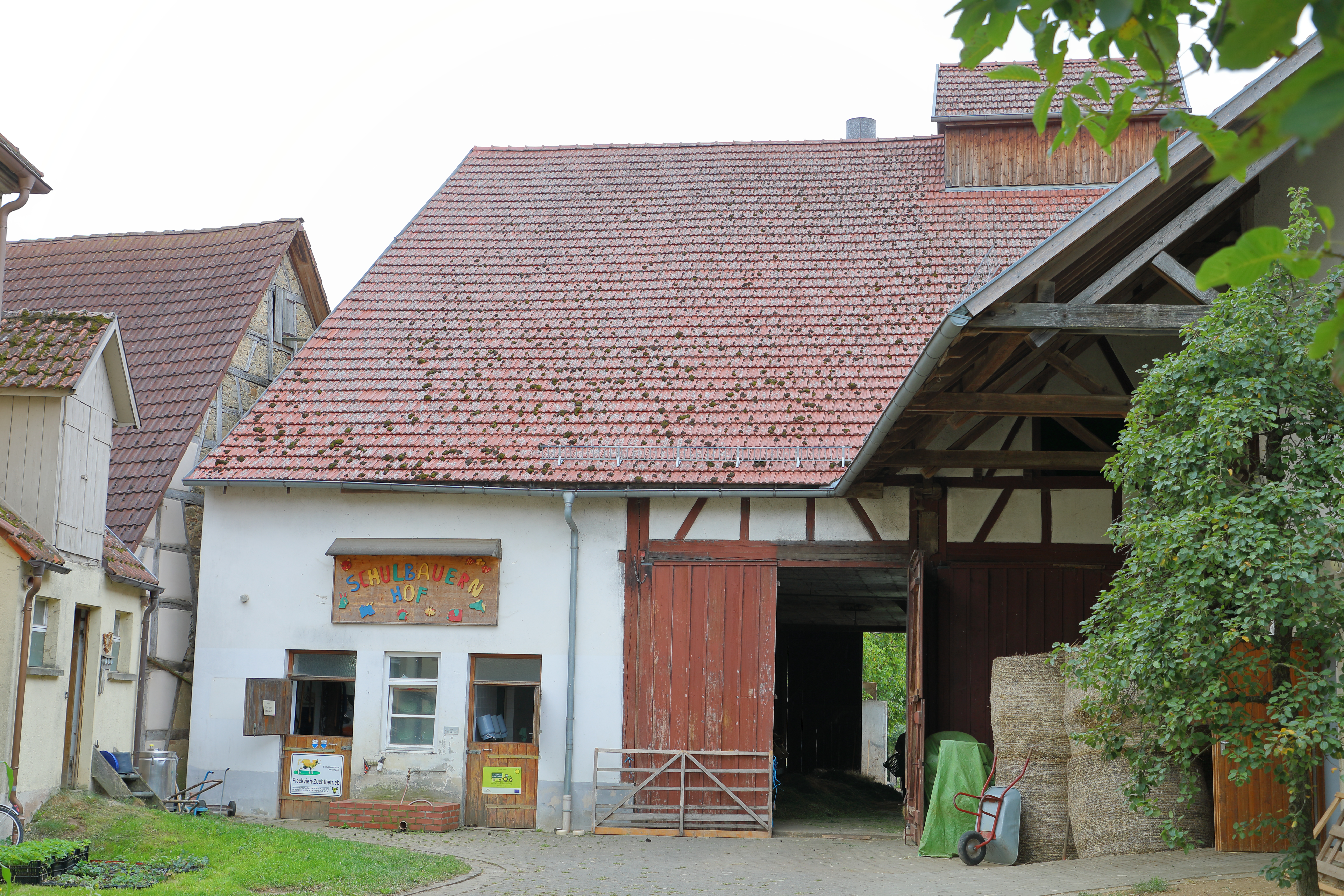 Der "Schulbauernhof Pfitzingen" ist eine Bildungseinrichtung des Landes Baden-Württemberg. Er ist u.a. in den denkmalgeschützten Gebäuden Pfitzingen 14 und Pfitzingen 41, dem "Schlösschen Pfitzingen" untergebracht.